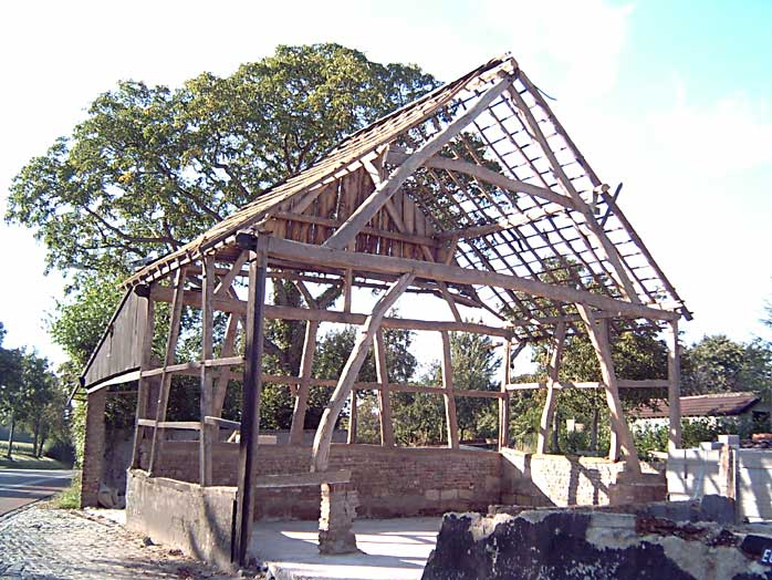 Limburgs: Ikkelder, de hoessjtool en de daaksjtool van ‘n vakwerkhoes